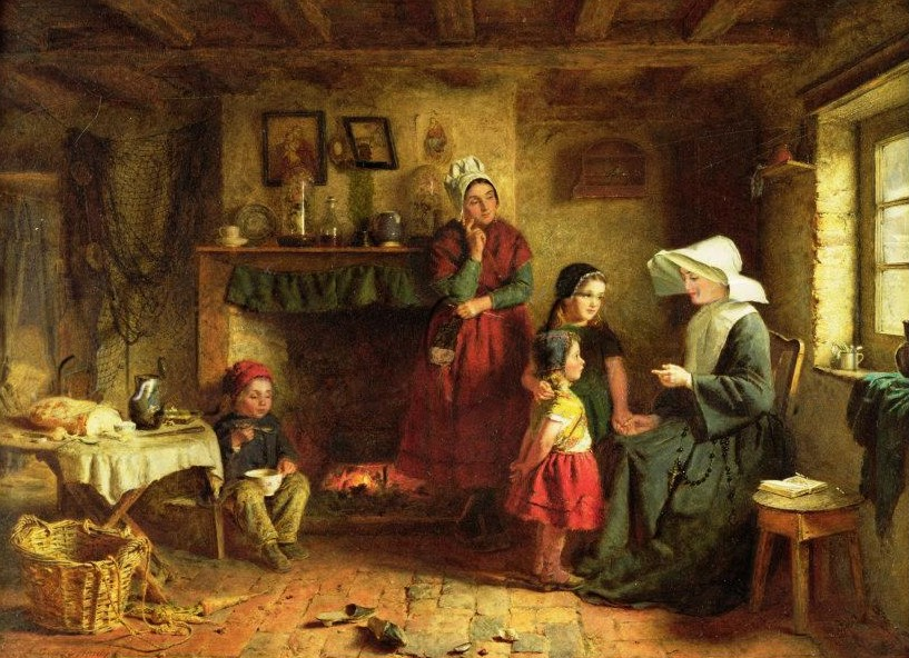 "La Soeur De Charite"